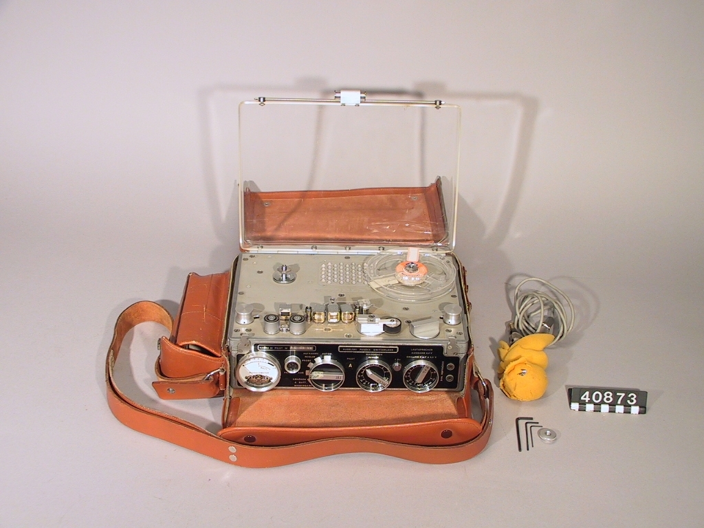 Denna bandspelare använde Gerd Almgren i Algeriet 1962.